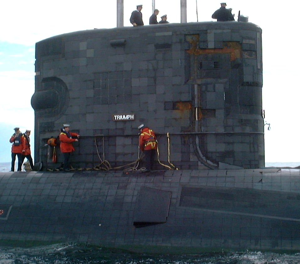 HMS Triumph